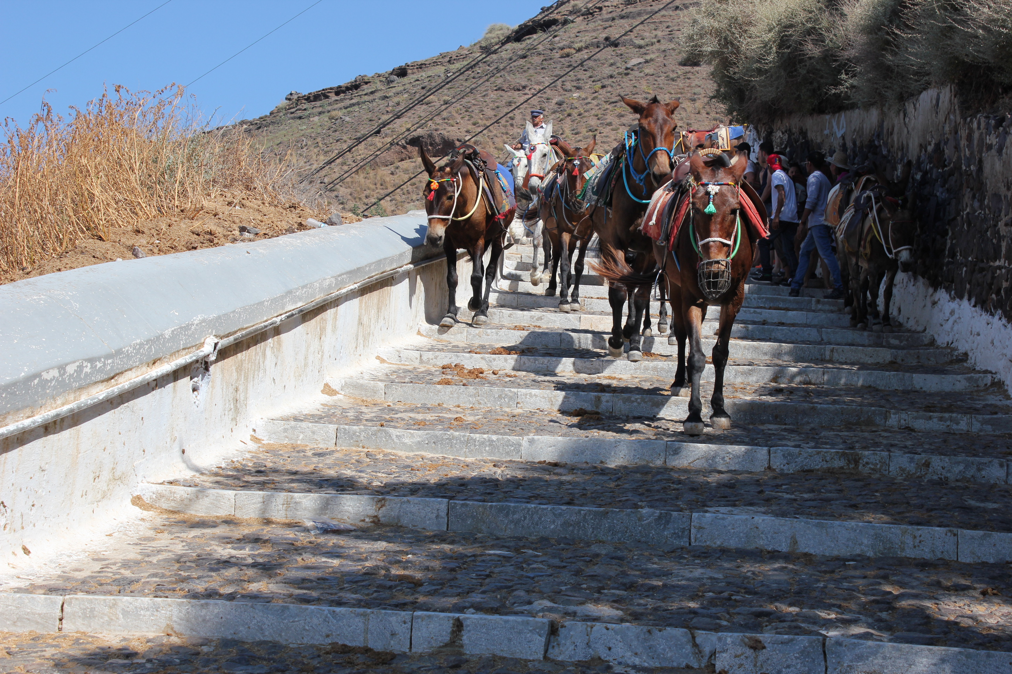 Für unter anderem Kreuzfahrttouristen gibt es die Möglichkeit, die Steintreppe hinauf auf die Insel mit Eseln zurückzulegen